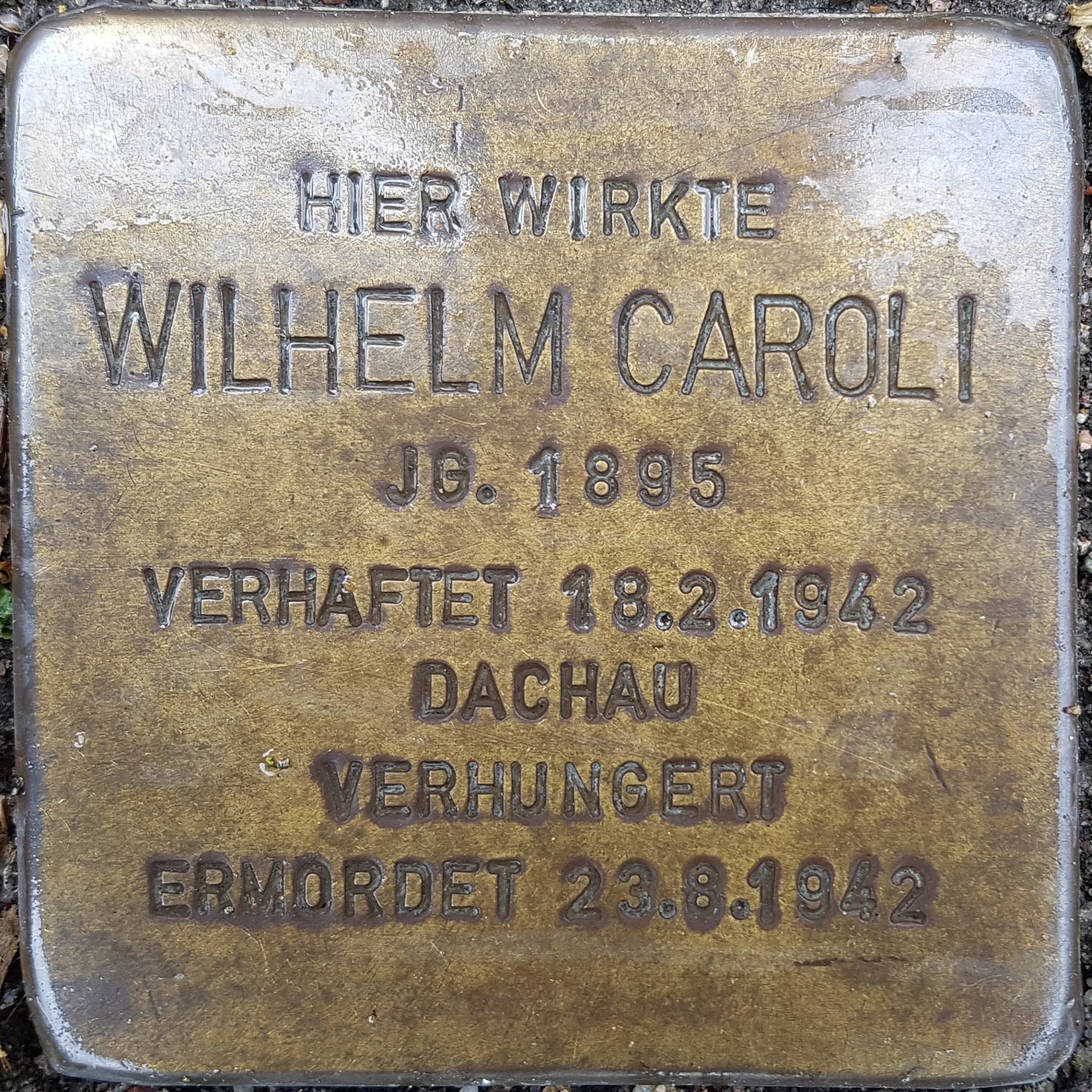 Stolperstein von Wilhelm Caroli in Ludwigshafen Rheingönheim, vor der katholischen Kirche St. Joseph, Carolistr. 23